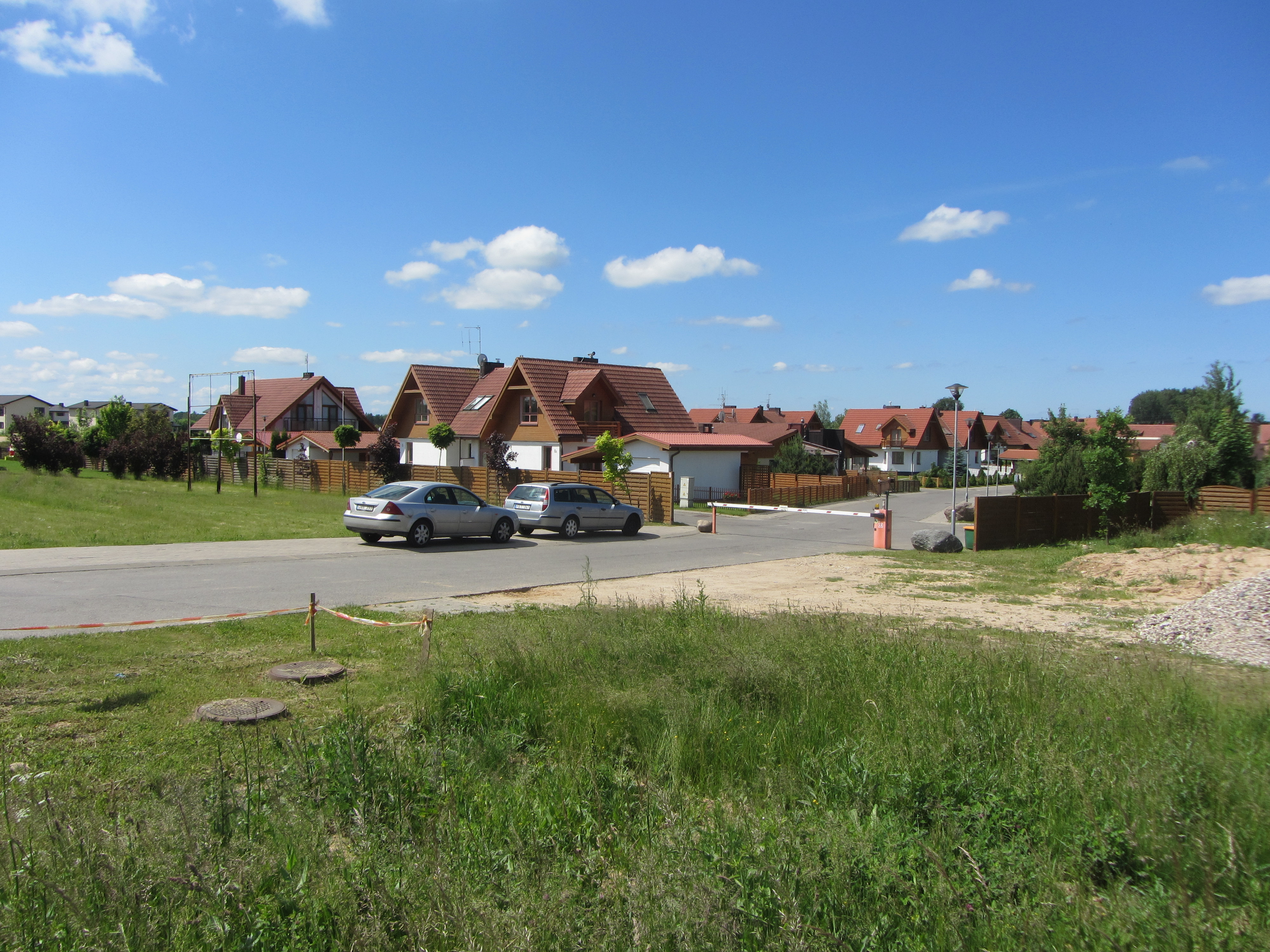 Klevinė, Lithuania